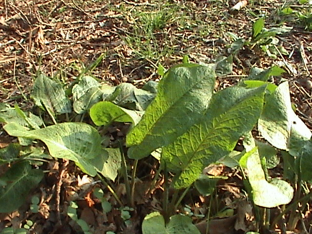 Rumex obtusifolius (Habitus)